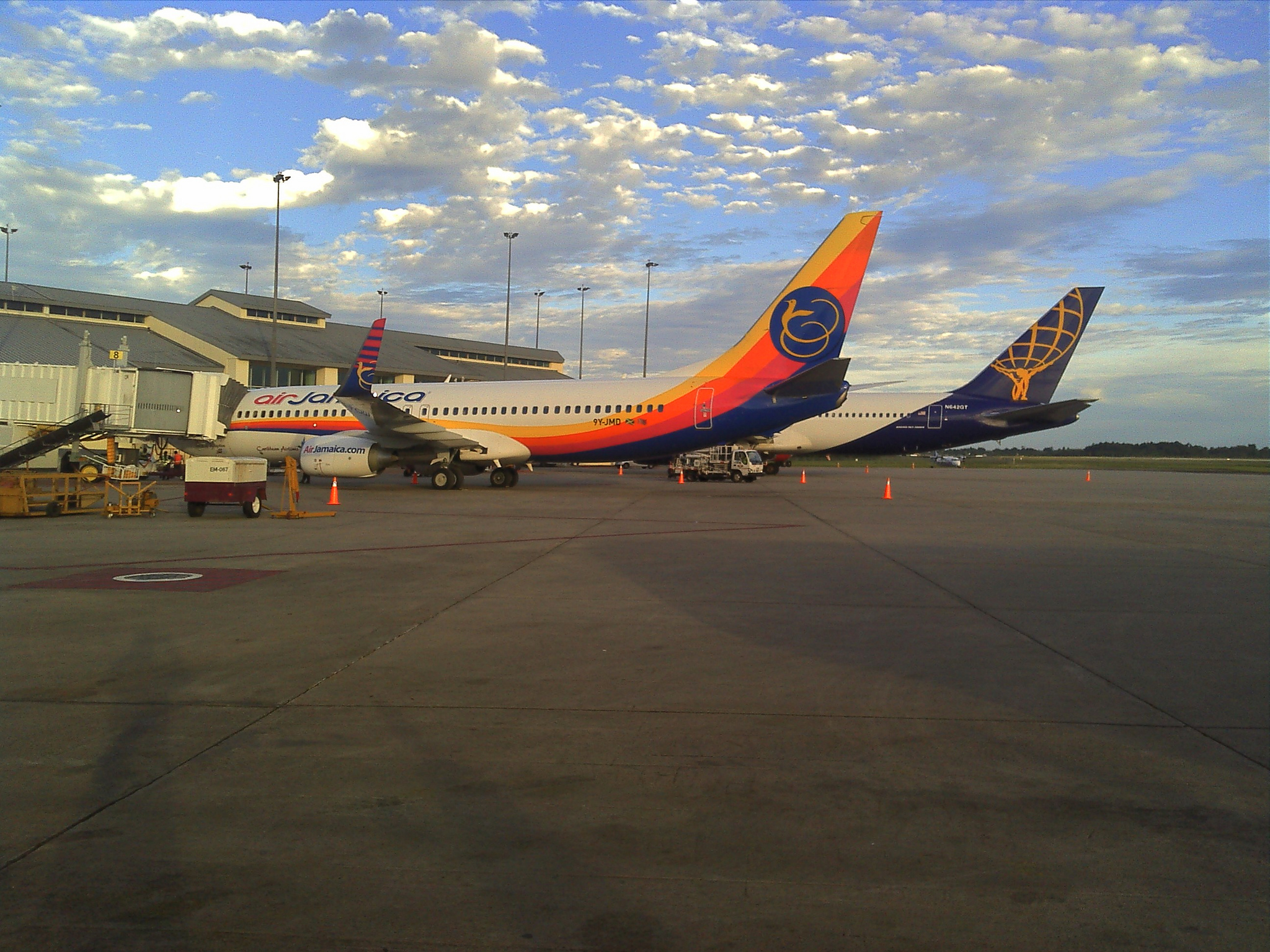 Rampa del Aeropuerto Internacional de Piarco, Trinidad & Tobago.